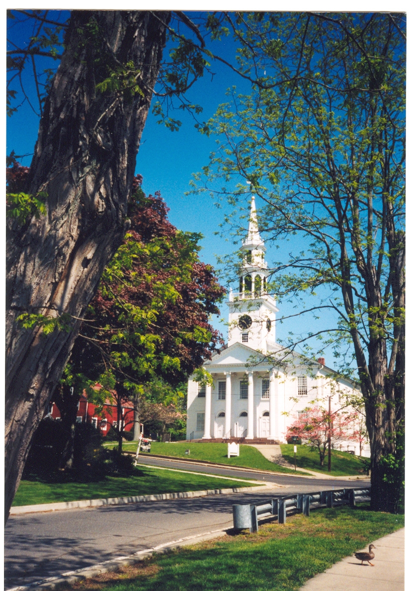 Milford, Connecticut, Kirche